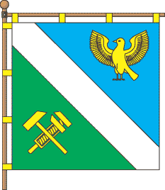 Хоругва смт Жвирка